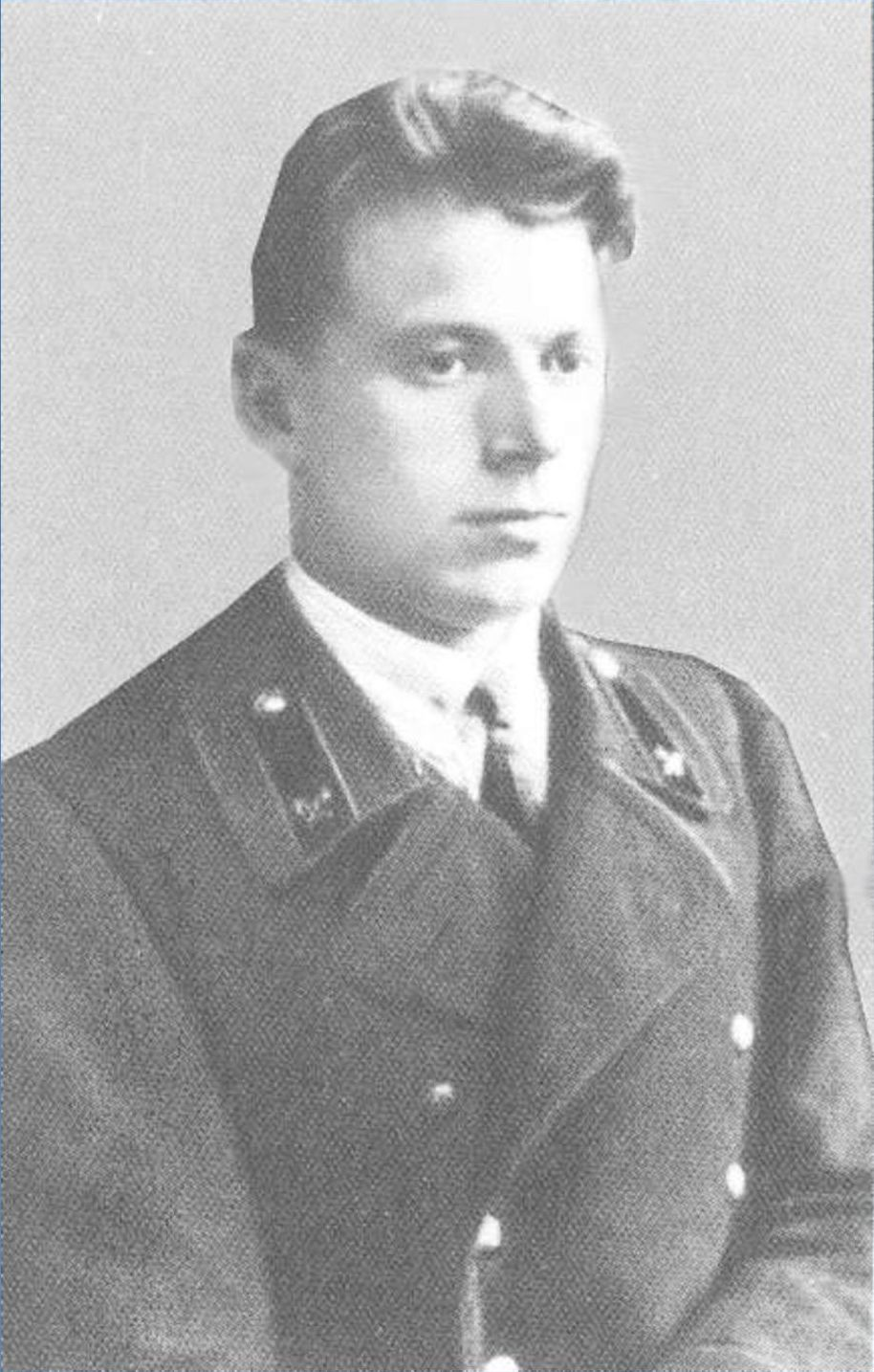 И. Комзин - студент I –го Московского строительного техникума